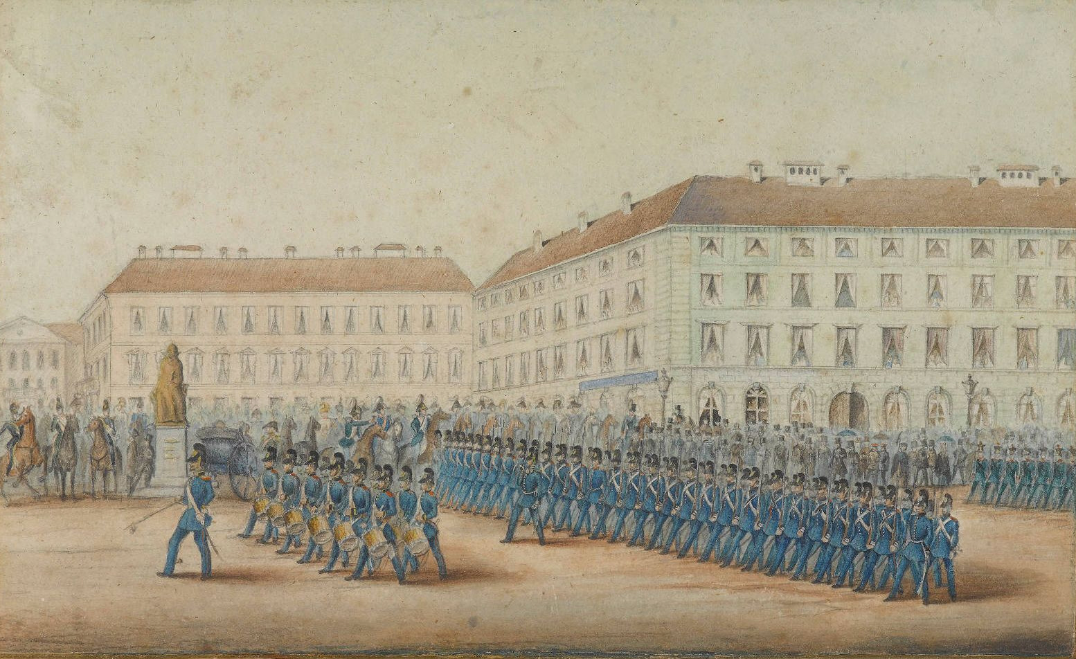 Erstes Erscheinen der K. B. Cadettencompagnie bei der Revue am 31. Maerz 1852, vor Sr. Majestaet dem Könige Maximilian II. von Bayern und den beiden k:k: russischen Großfürsten Michael und Nicolaus. Parade vor dem Leuchtenbergpalais in München. Auf dem Untersatz signiert und 1852 datiert, auf dem Untersatz betitelt. Aquarell über Bleistift. 17,4 x 28,6 cm